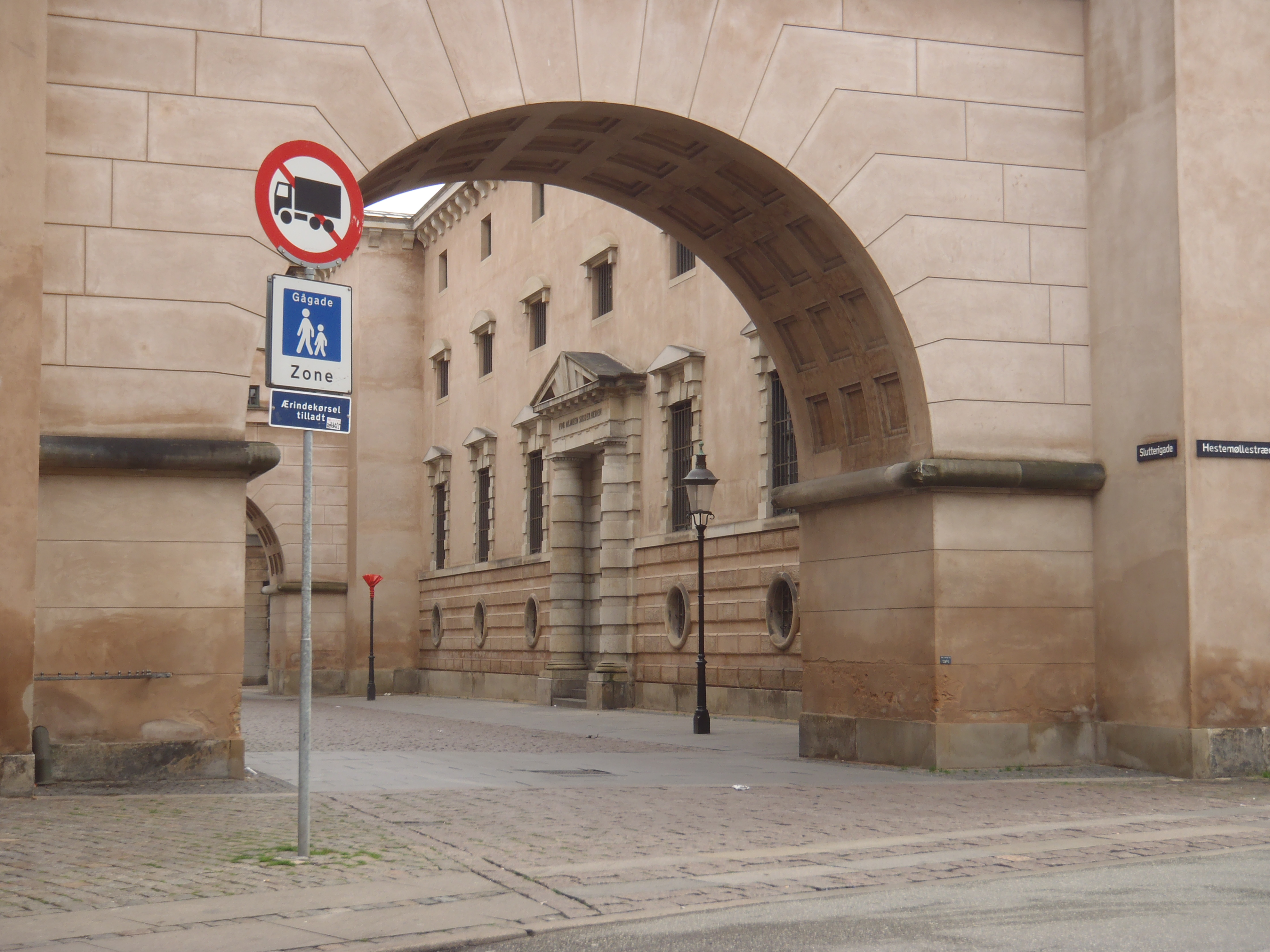 Arrestbygningen ved råd- og domhuset i København. Fotografiet er taget omtrent samme sted som Martinus Rørbye maleri fra 1831